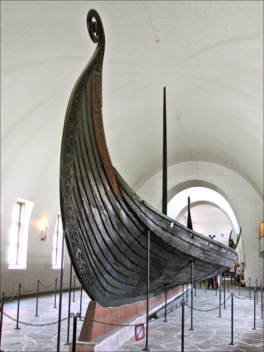 Le bateau d'Oseberg dans le musée des Bateaux vikings à Oslo (Vikingskipshuset). Ce bateau, mis au jour en 1904, a été construit entre 815 et 820 et a été utilisé comme bateau funéraire pour une femme de haut rang qui est morte en 834. Le corps se trouvait dans une chambre funéraire en bois placée sur le pont. Autour du corps ont été découverts de nombreux objets en bois, cuir et textiles. Le bateau, long de 22 m, est en bois de chêne. Il comportait 30 rameurs et n'était pas un bateau construit pour la haute mer. Le musée présente trois bateaux vikings, très bien conservés, ainsi que des objets, qui ont été découverts dans trois tertres funéraires près du fjord d'Oslo.